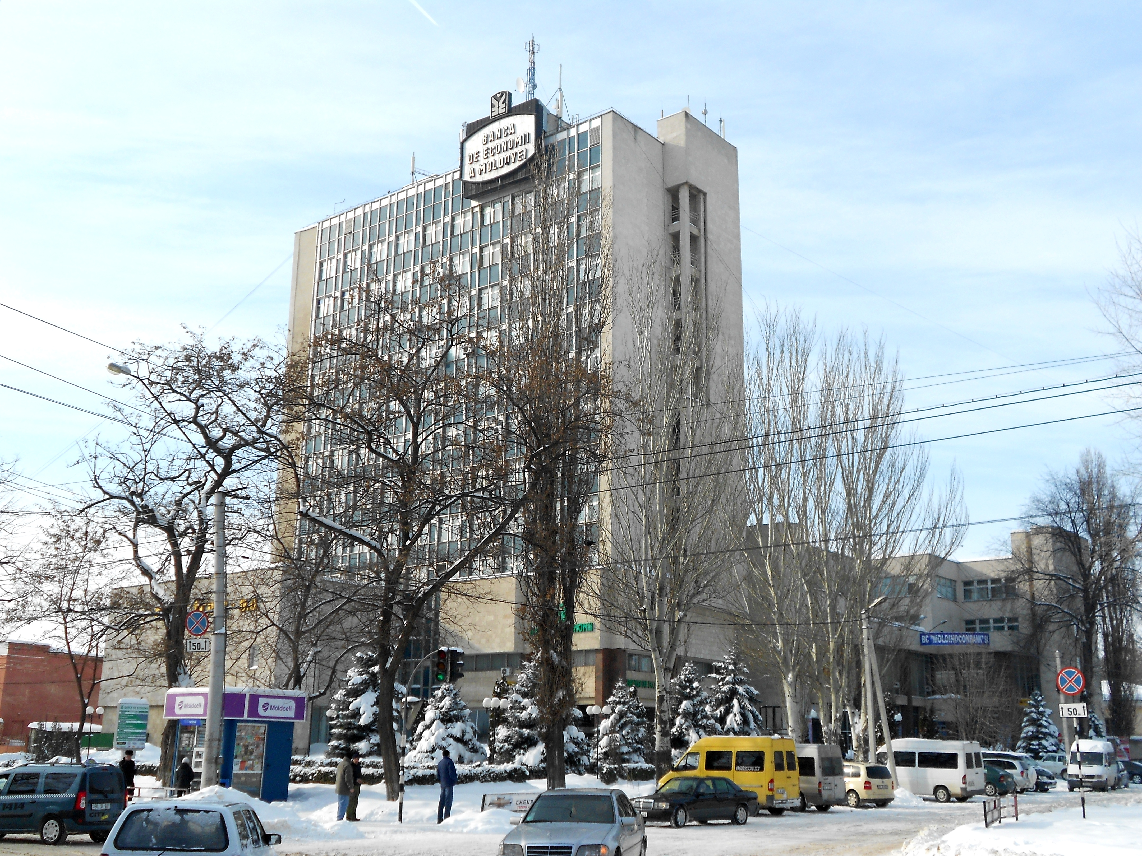 Banca de Economii a Moldoveii, Bălți